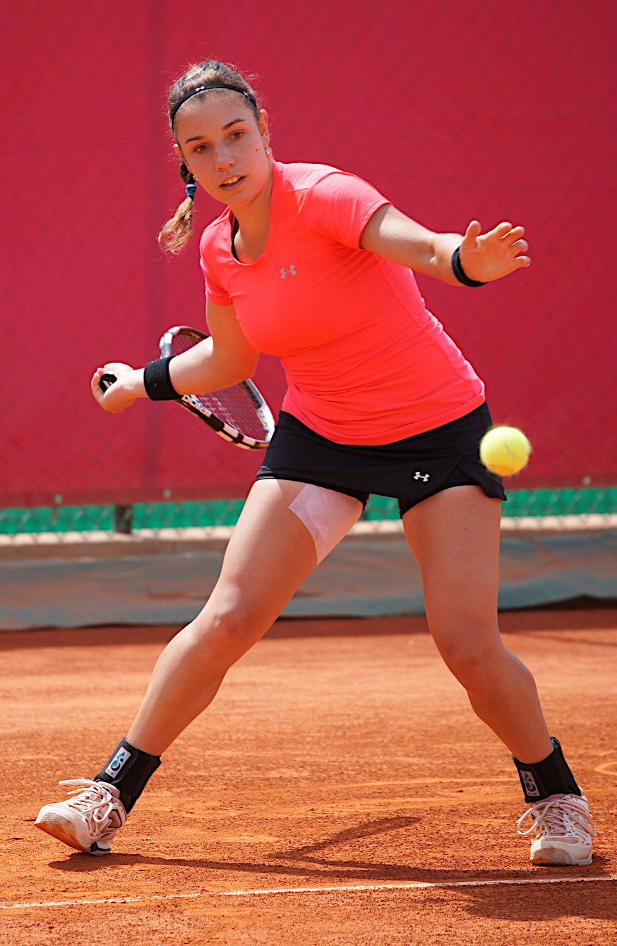 Sharon Fichman, Cagnes-sur-Mer 2013